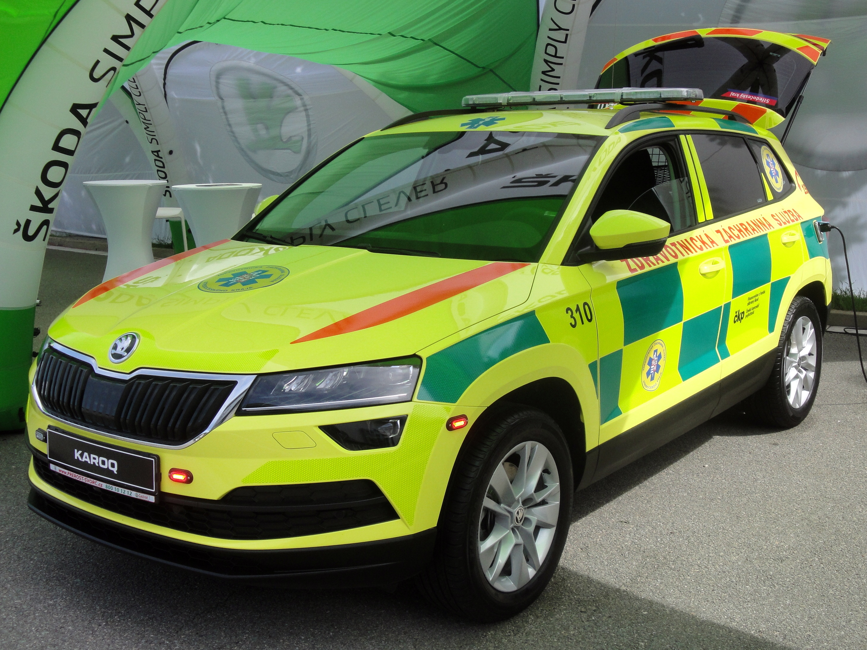 Skoda Karoq, IDET/PYROS/ISET 2019, Brünn